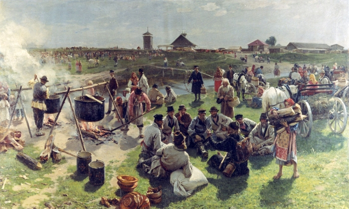 Общий жертвенный котел в престольный праздник. Экспонировалась на 16 передвижной выставке 1888 г.